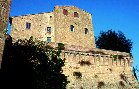 Castelfalfi, in the commune of Montaione, province of Florence, Tuscany, Italy